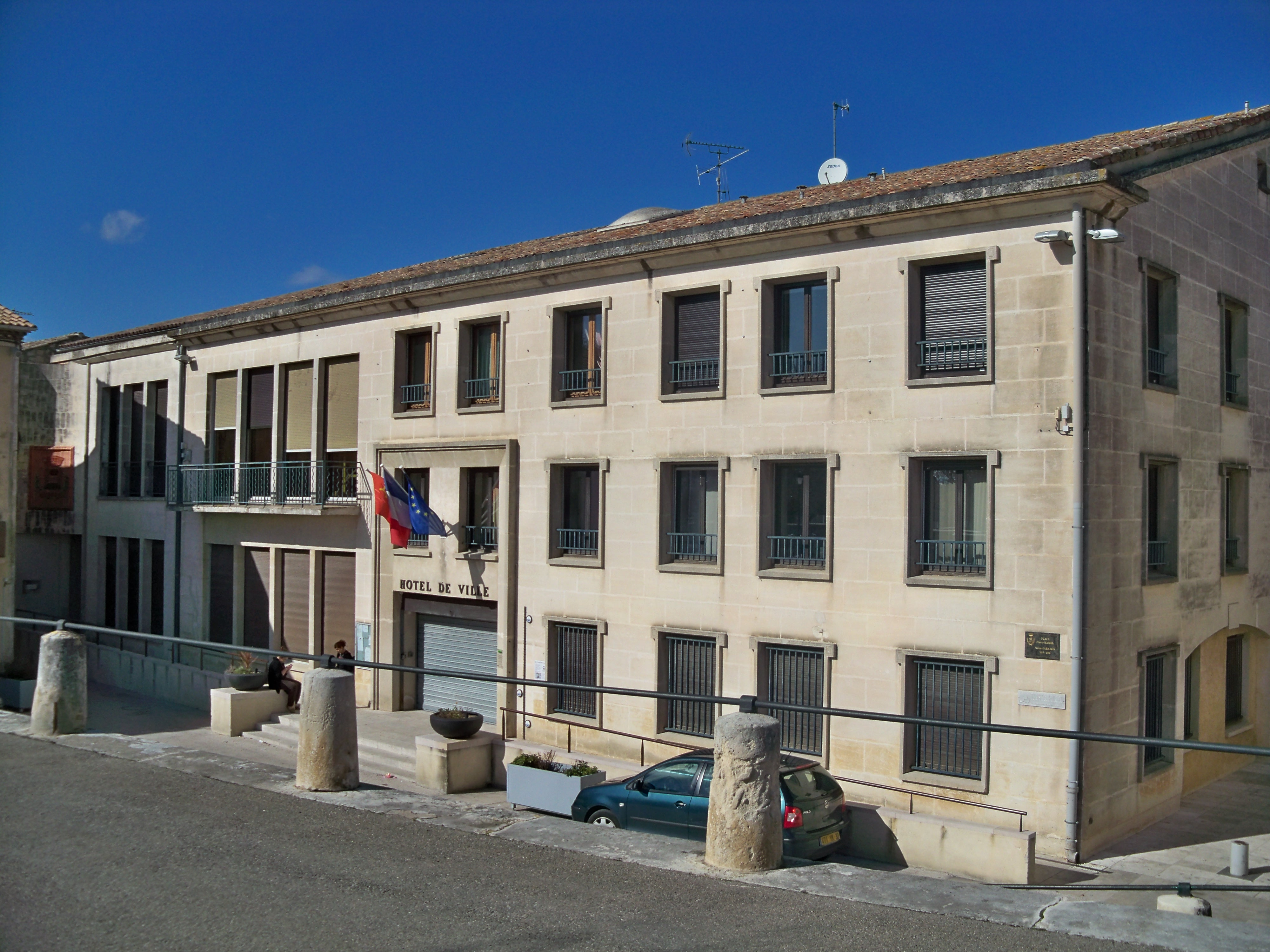 mairie d'Aramon (30)